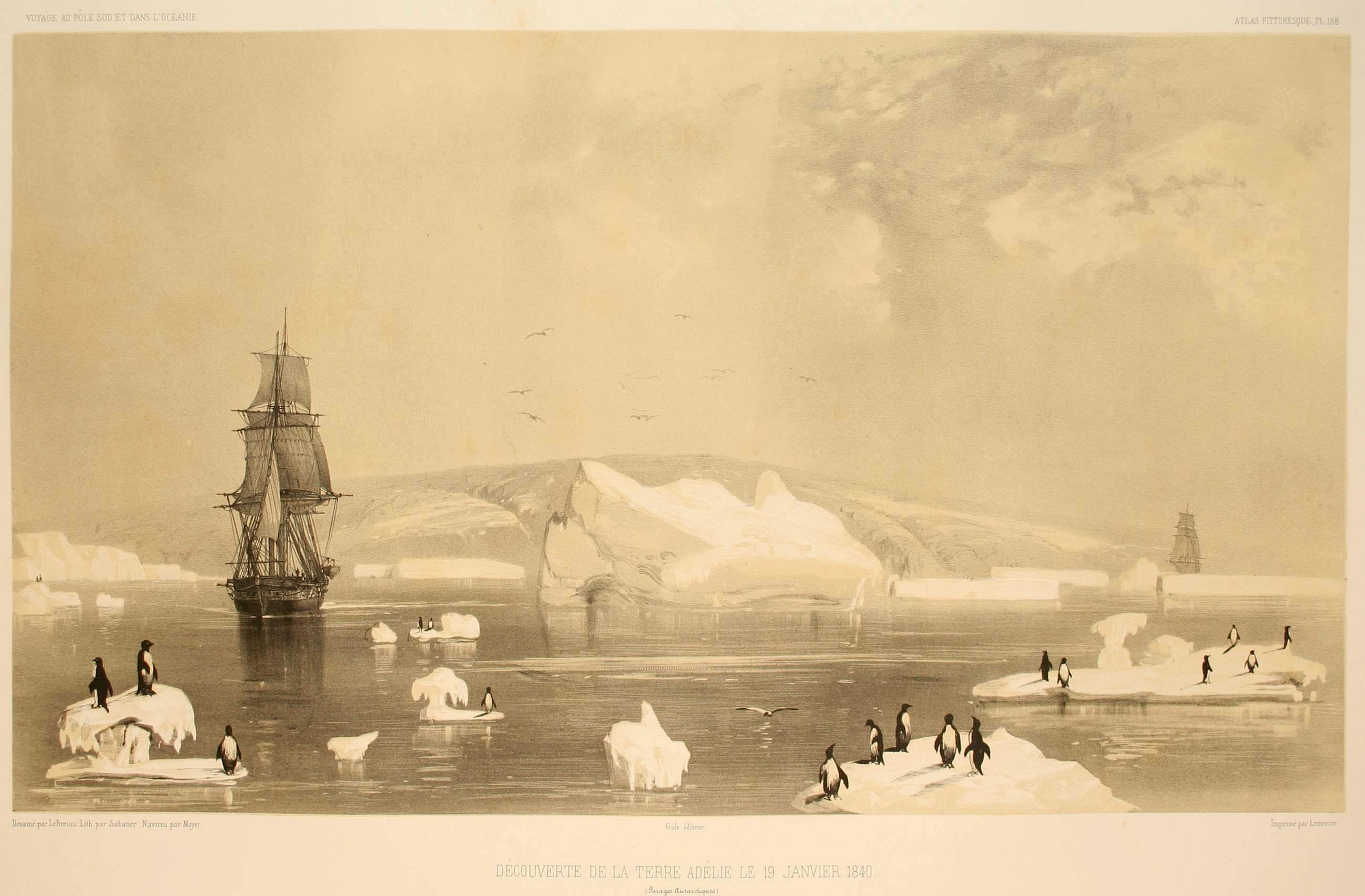 Découverte de la Terre Adélie, le 19 janvier 1840. Atlas pittoresque, planche 168